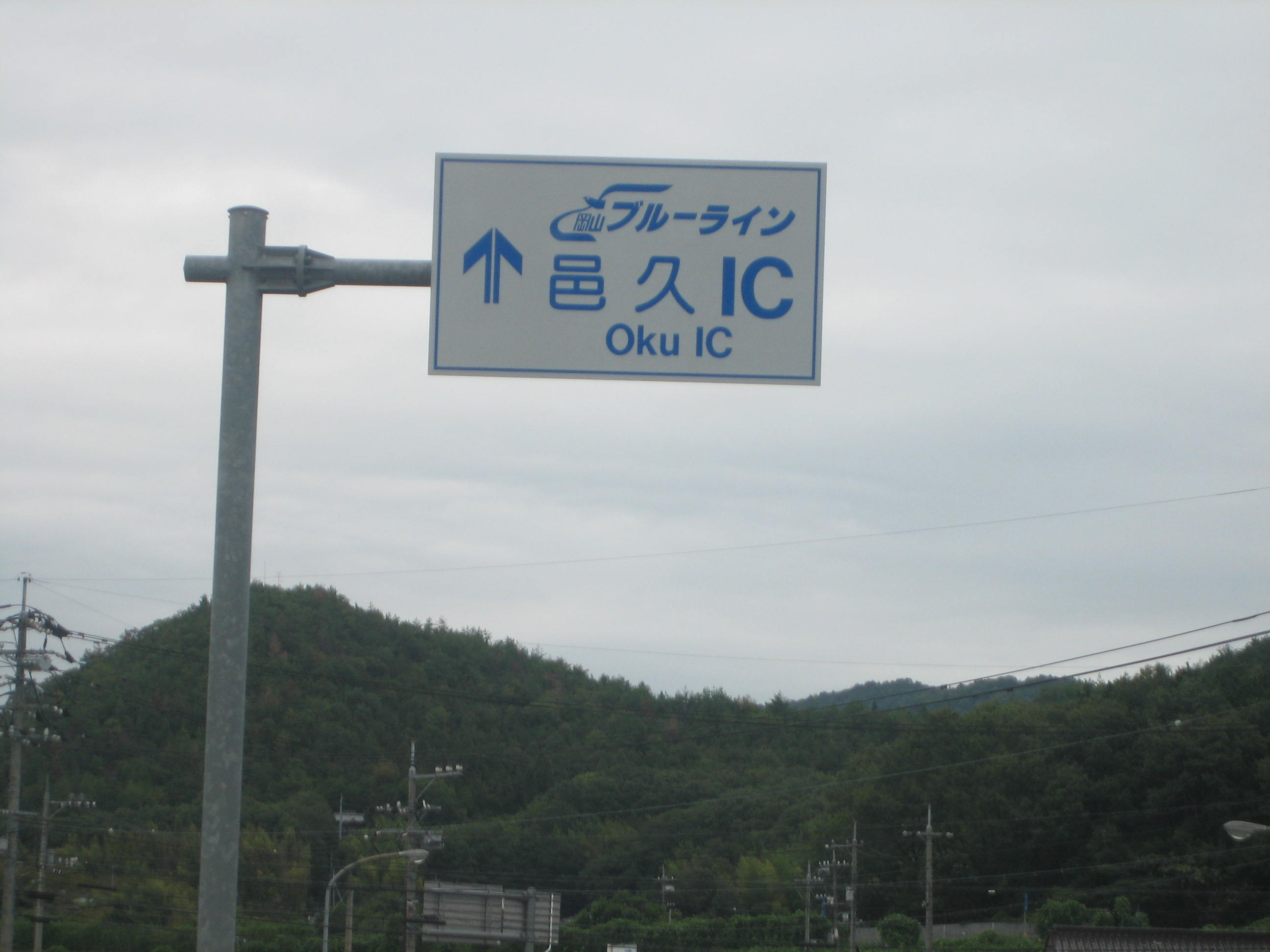 邑久IC